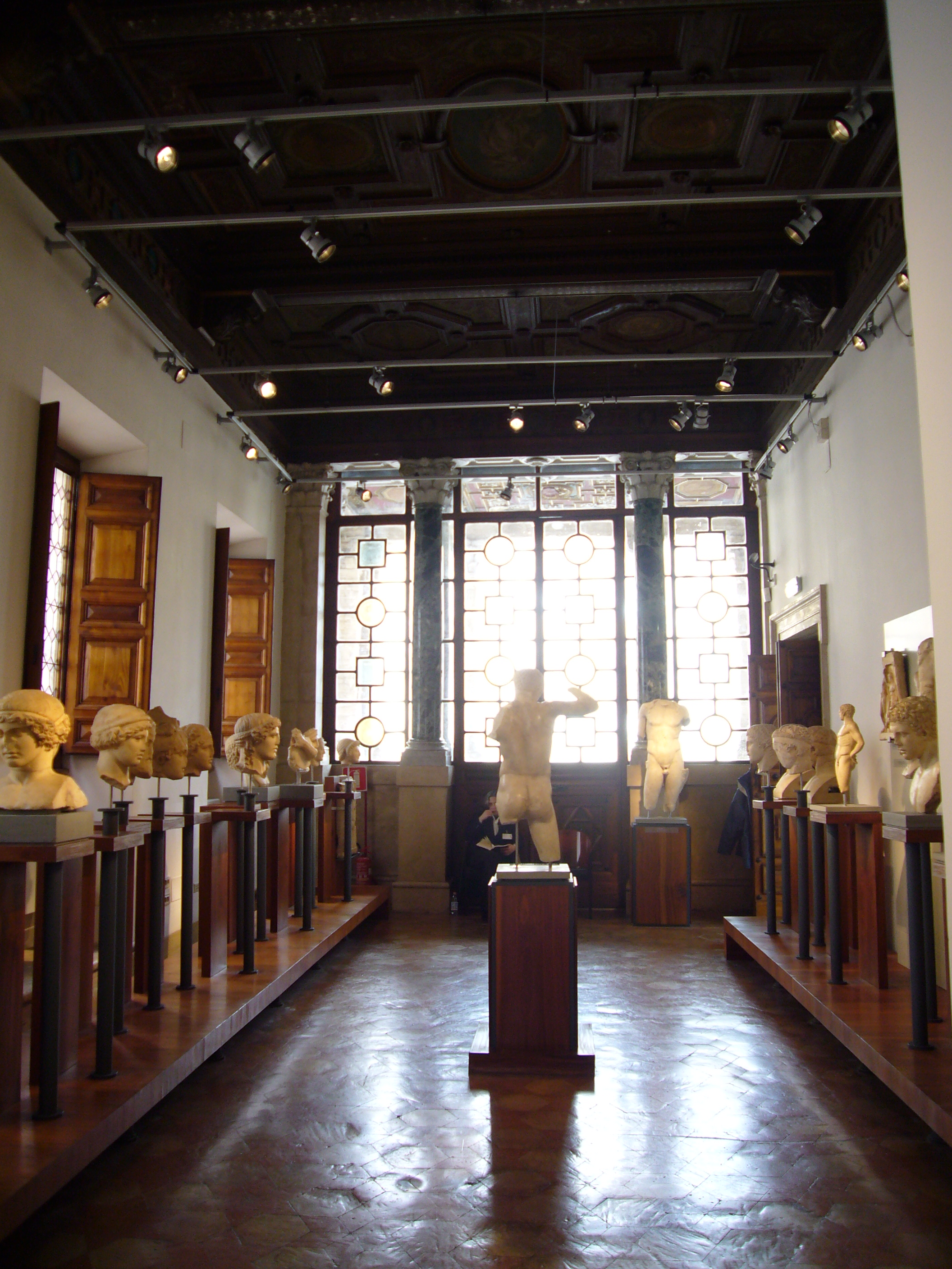 Roma, Museo Barracco: sala V, sculture greche.